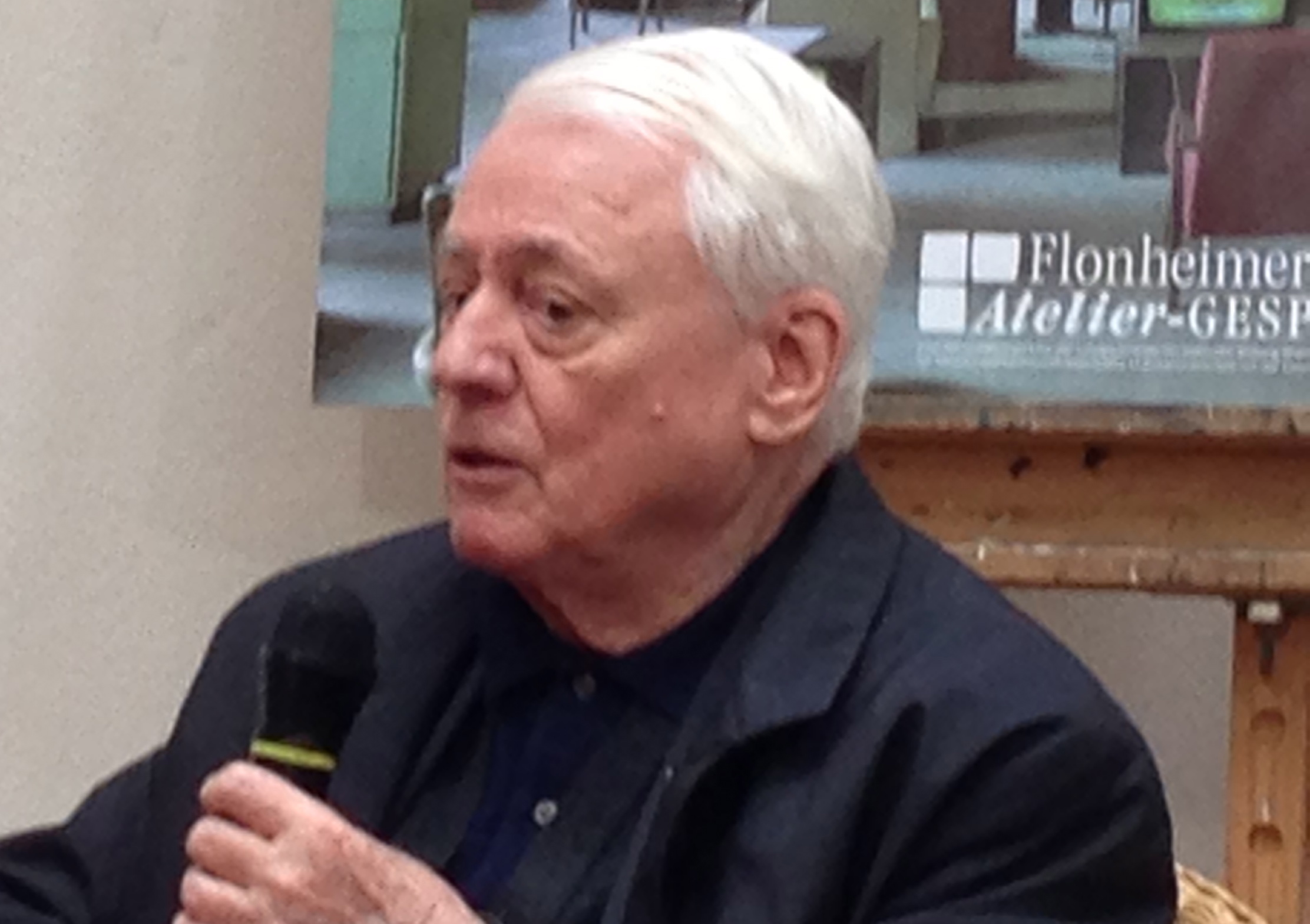 Alexander Kluge am 24. Mai 13 Atelier-Gespräche, Flonheim